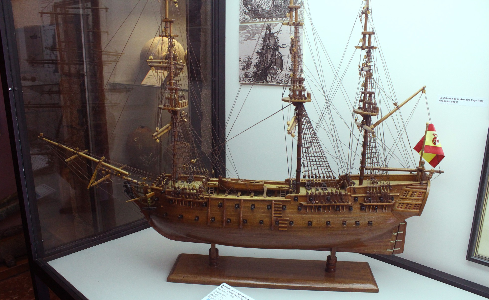 Castillo de San Antón, de finales del siglo XVI, en La Coruña.